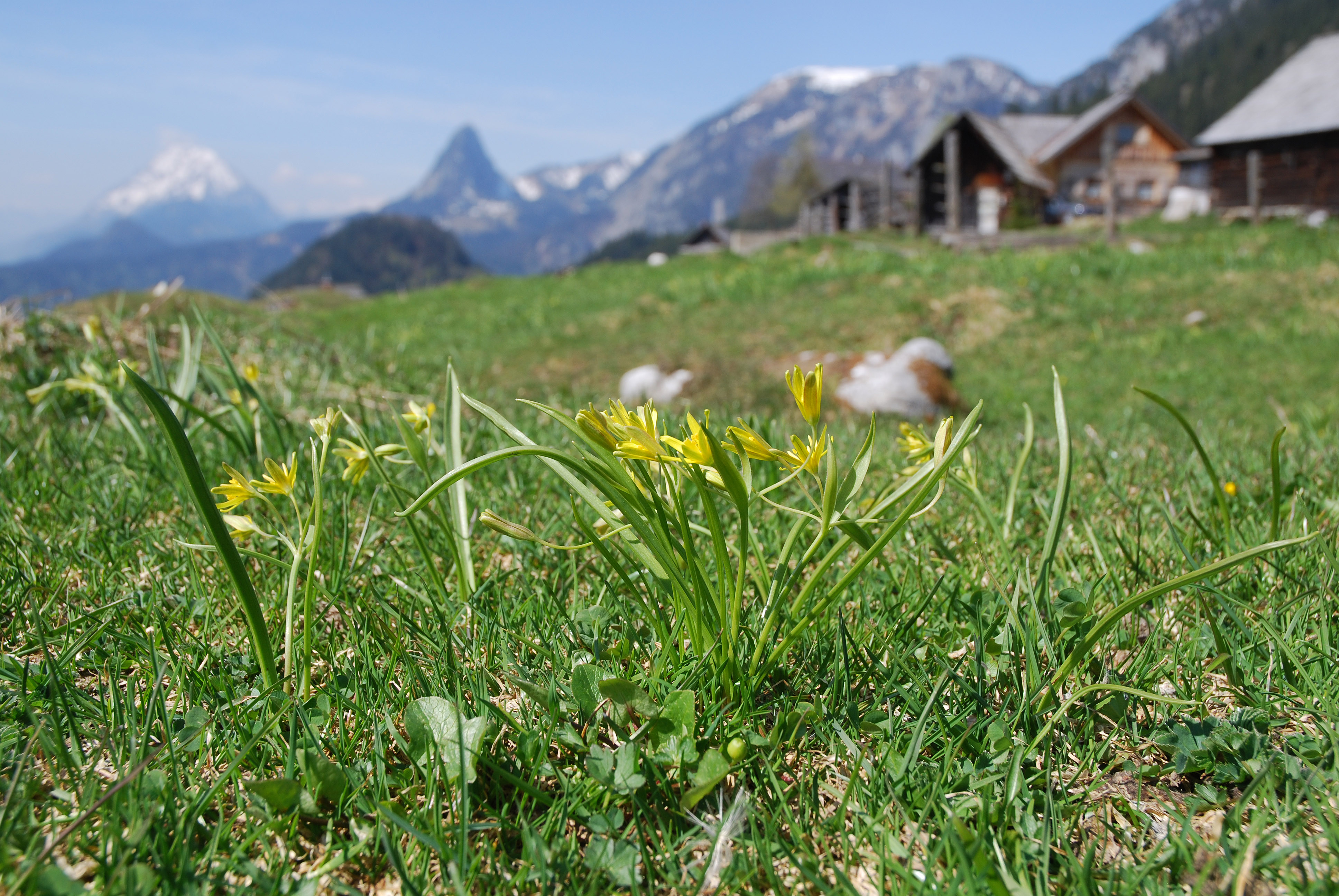 Gagea lutea, Hinteregger Alm ~1.200 m, Styria, Austria